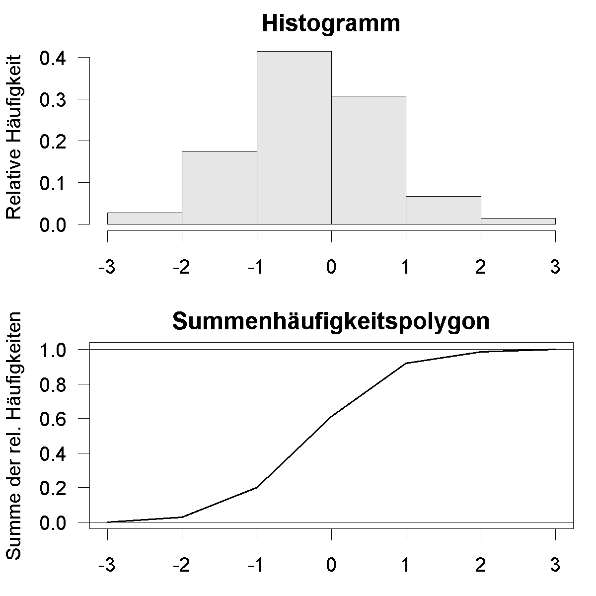 Summenhäufigkeitspolygon